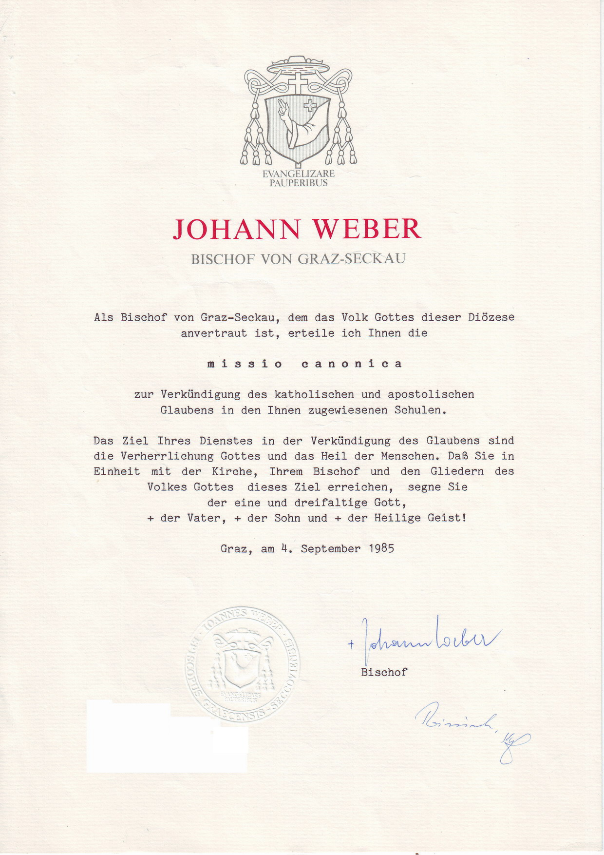 missio canonica für den Dienst im Religionsunterricht, ausgestellt von Bischof Johann Weber, 4. September 1985